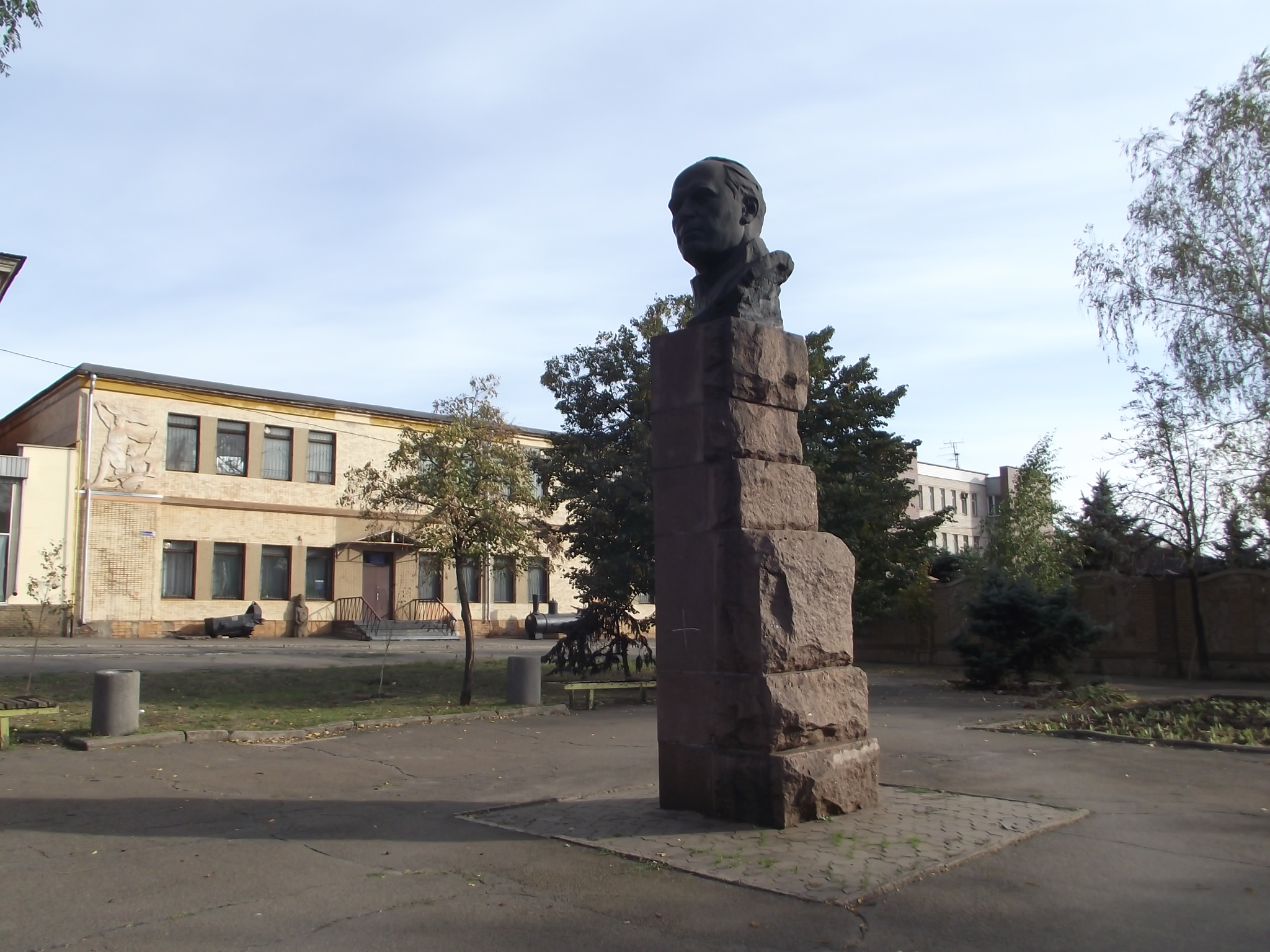 Погруддя В.А.Валявка, Кривий Ріг, вул. Каунаська, 16, сквер імені Валявка